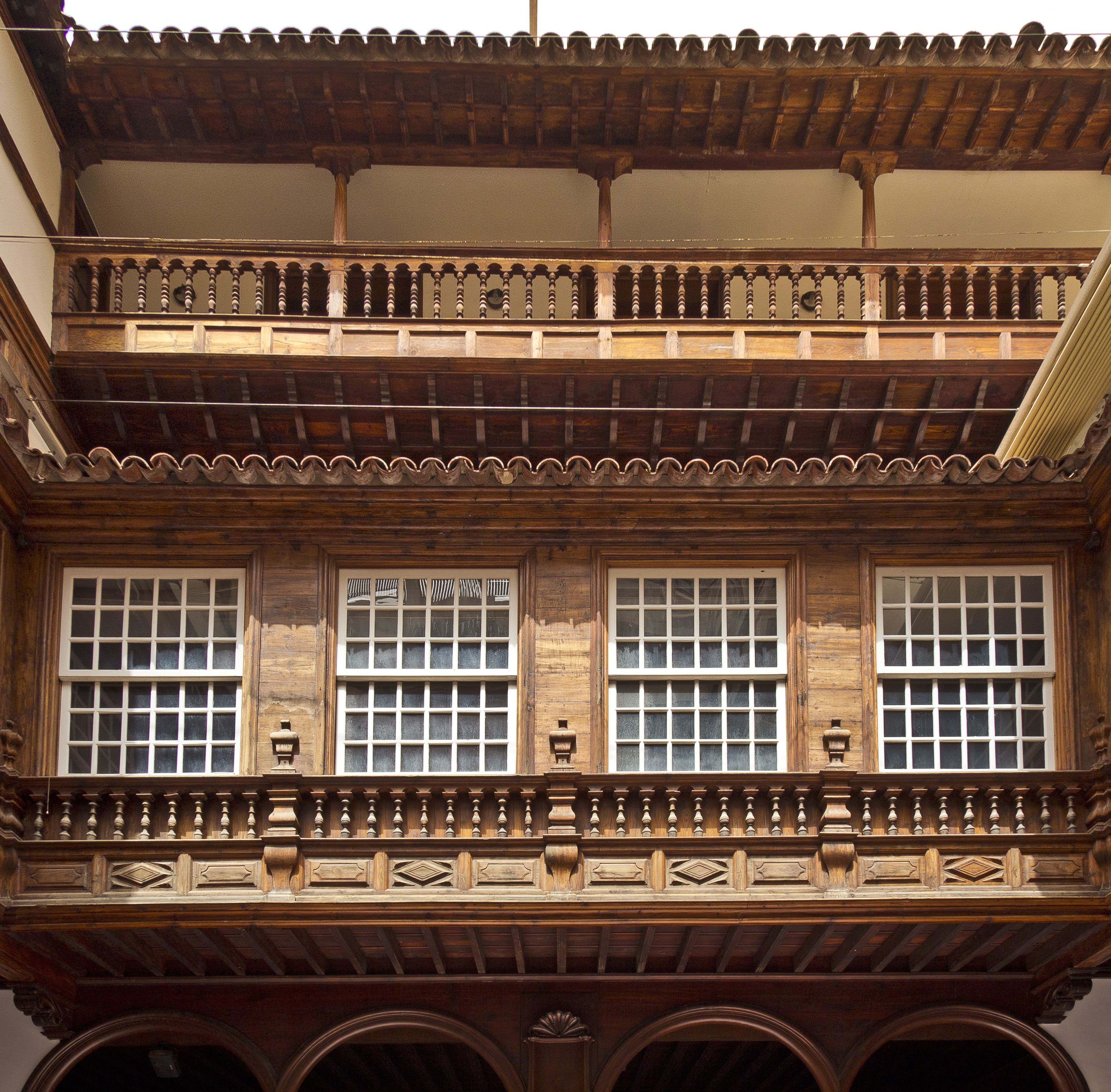 Der Innenhof des Palacio de Carta an der Plaza de la Candelaria in Santa Cruz de Tenerife wurde zwischen 1721 und 1752 erbaut.